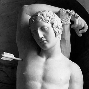 Statue de St Sébastien - Eglise de Fresnay en Retz - France